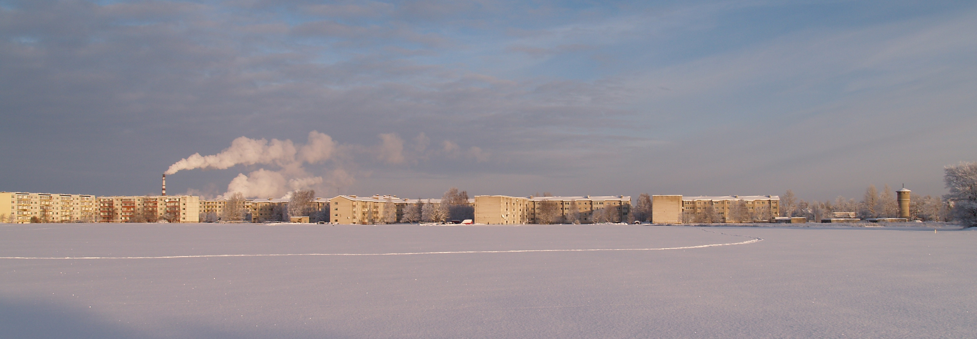 Talvine Kehra linn vaadatuna Kose–Jägala maanteelt.